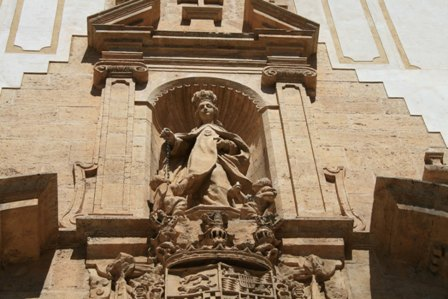 Titula del templo